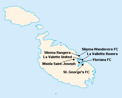 Répartition des clubs en First Division Maltaise 1925-1926.